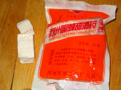 酒藥，自攝於家。-- polyhedron(古韻) 留言 21:35 2005年12月2日 (UTC)